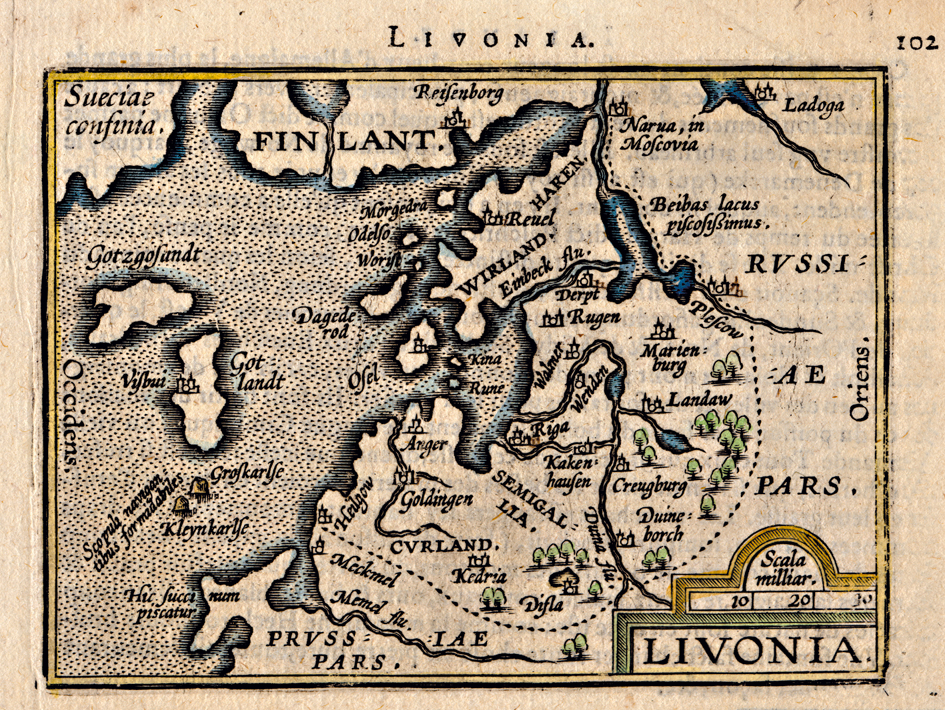 Livonia. Copper engraving, ca 1:9 700 000, 8 x 11 cm.